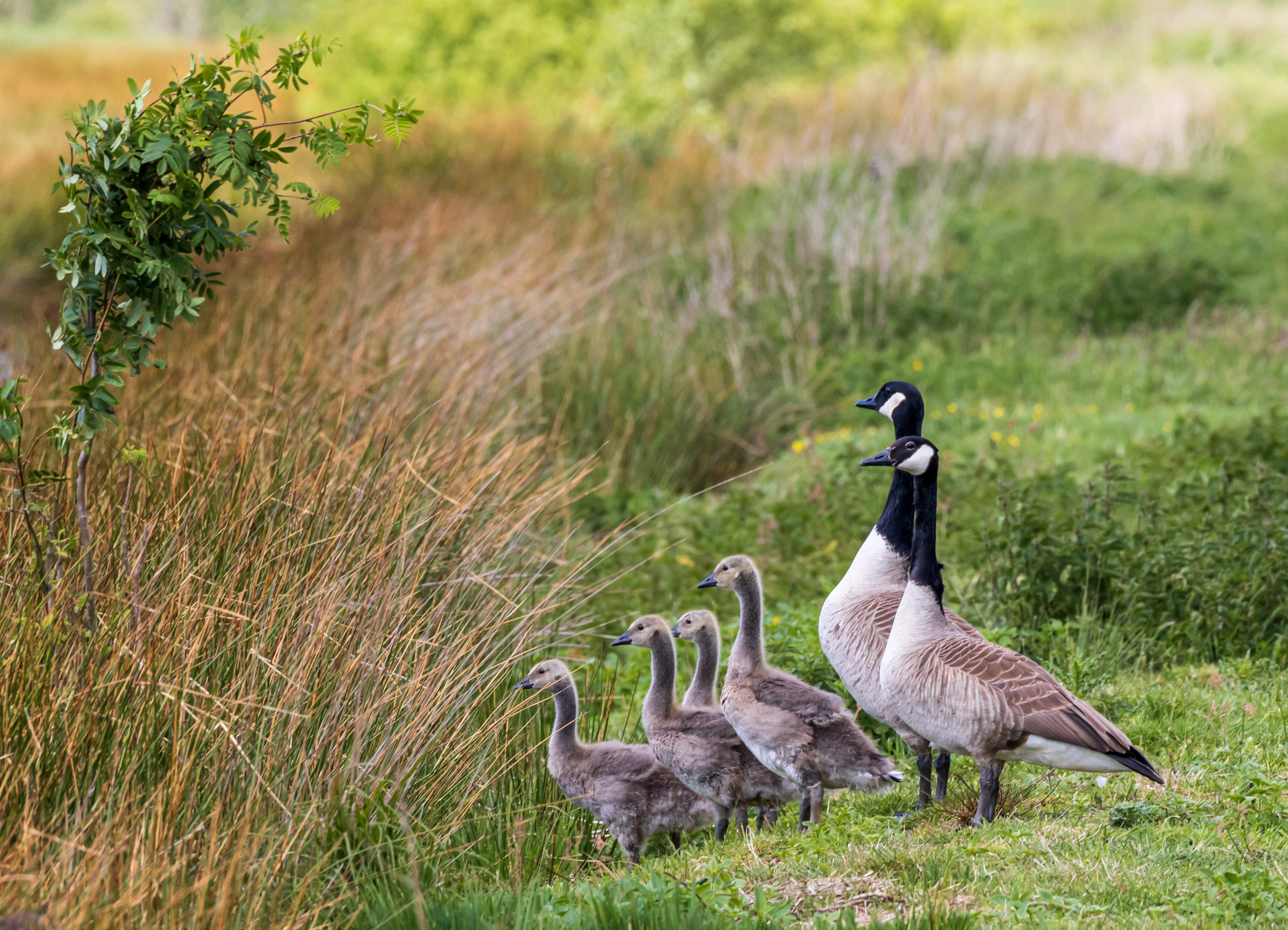 Kanadagansfamilie im Landschaftsschutzgebiet Wildes Moor (Kreis Rendsburg-Eckernförde)